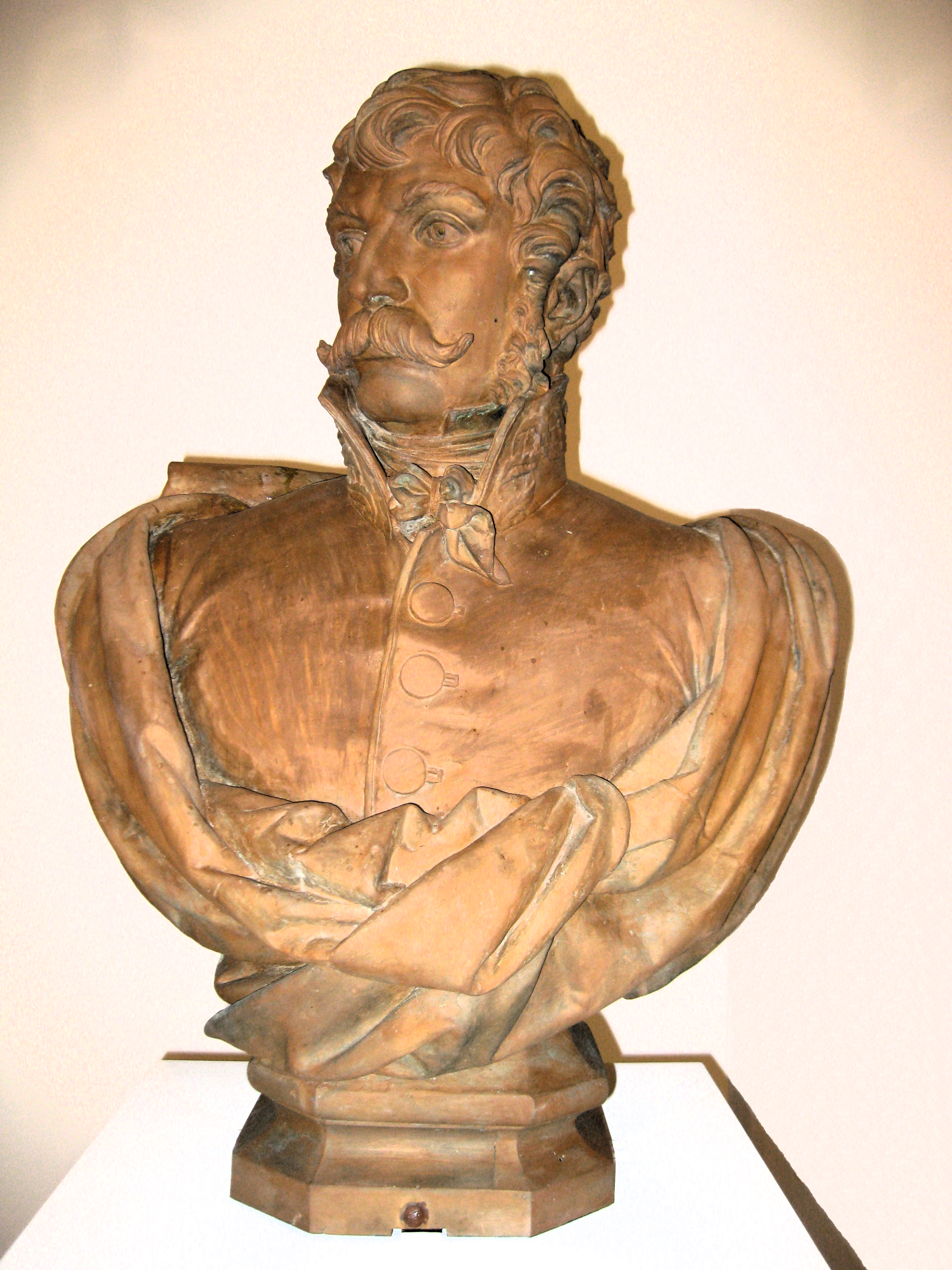 Juan Martín Díez "El Empecinado" (1775–1825) militar español, héroe de la Guerra de la Independencia de España, en la que participó como jefe de una de las guerrillas legendarias que derrotaron repetidas veces al ejército napoleónico. Busto de bronce del escultor italiano Carlos Nicoli de 1880, exhibido en Alcalá de Henares (Comunidad de Madrid - España)